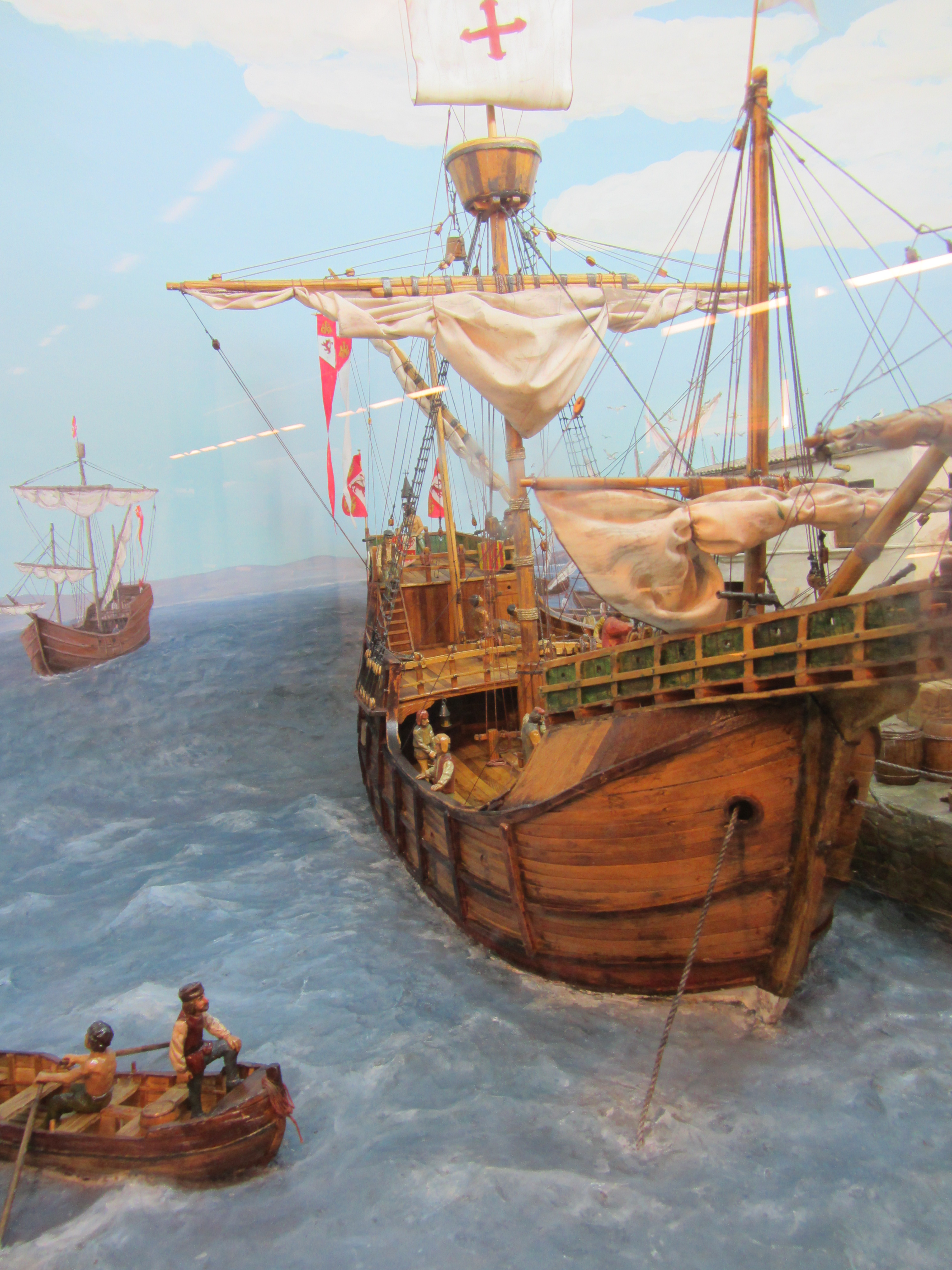 Puerto de Palos 1492, diorama de Zerreitug en la estación de metro Cristóbal Colón, Santiago de Chile.